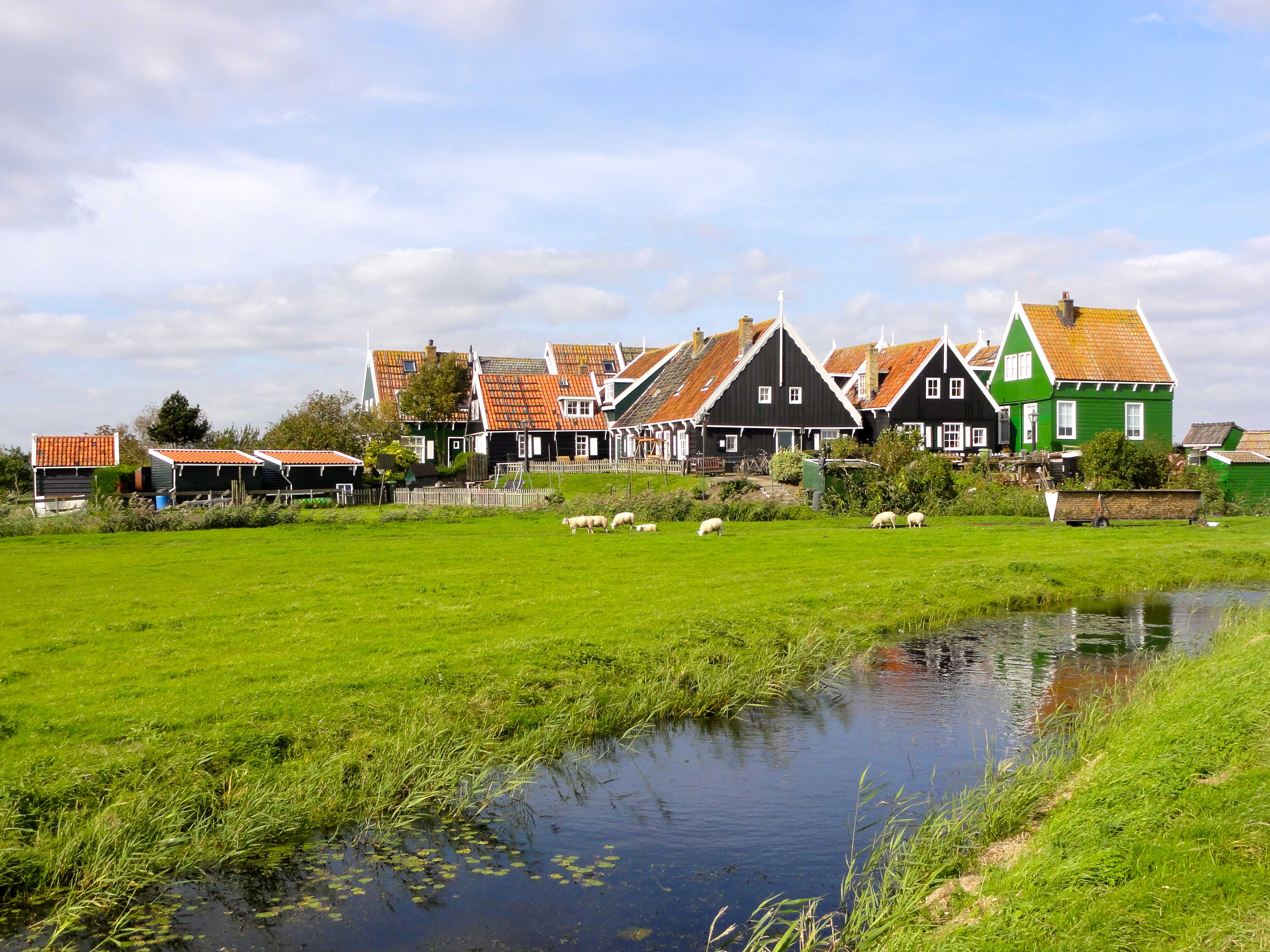 De Grotewerf Marken